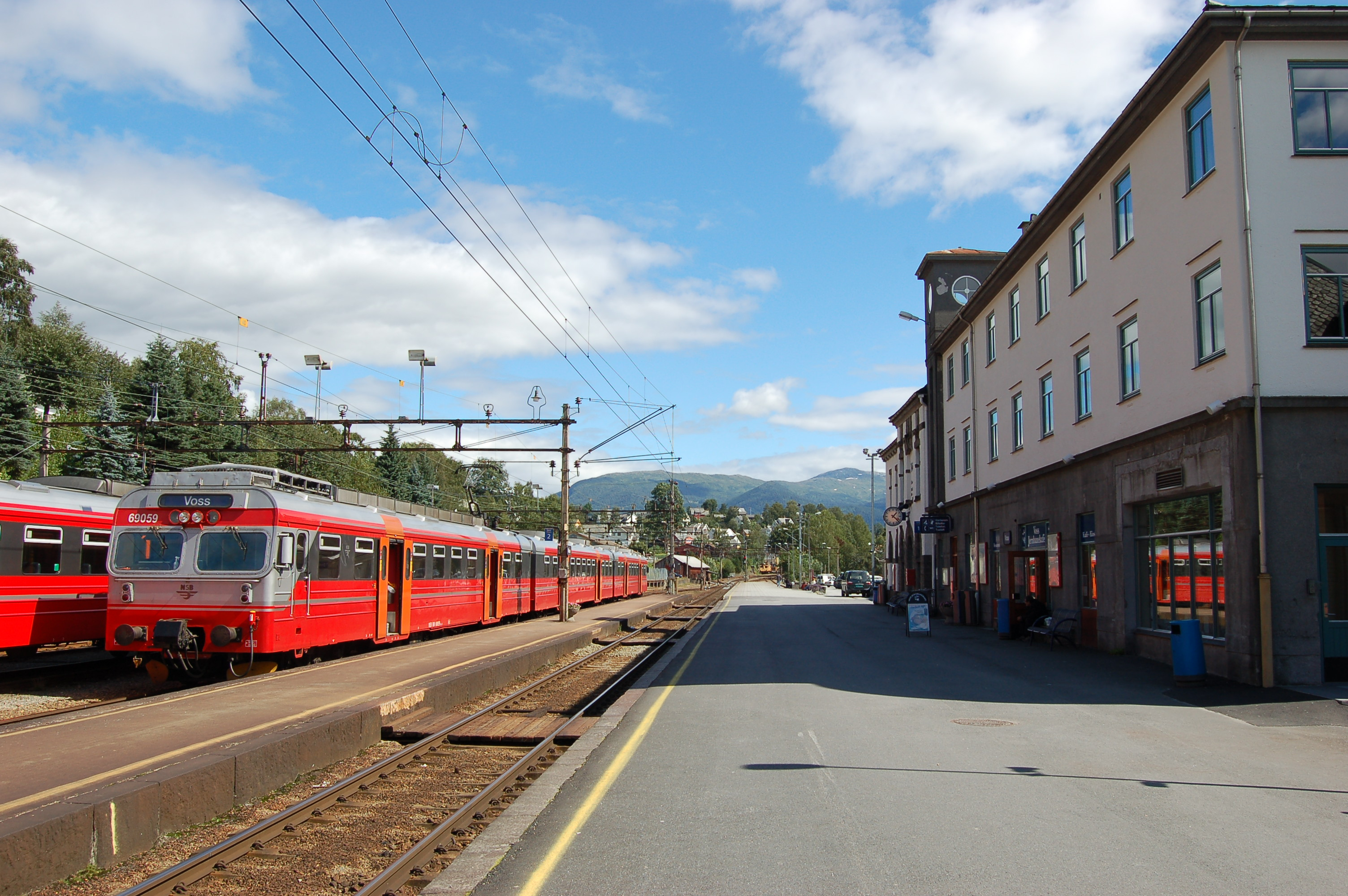 Voss Station on Bergensbanen in Voss, Norway